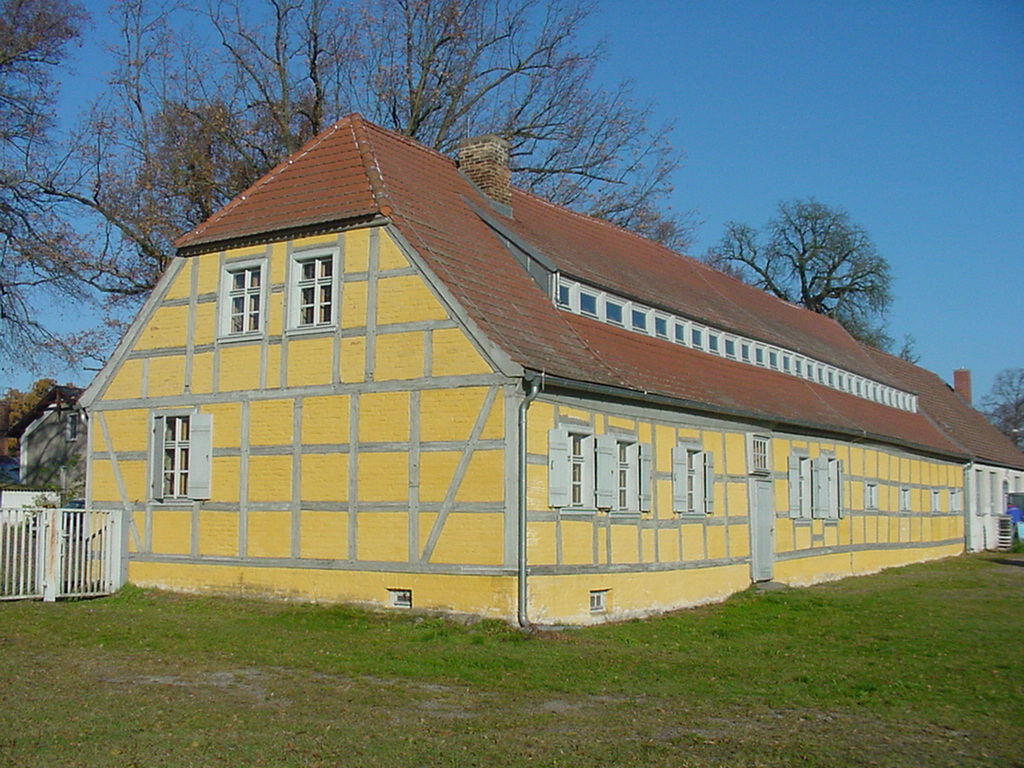 Altes Amtshaus Golzow